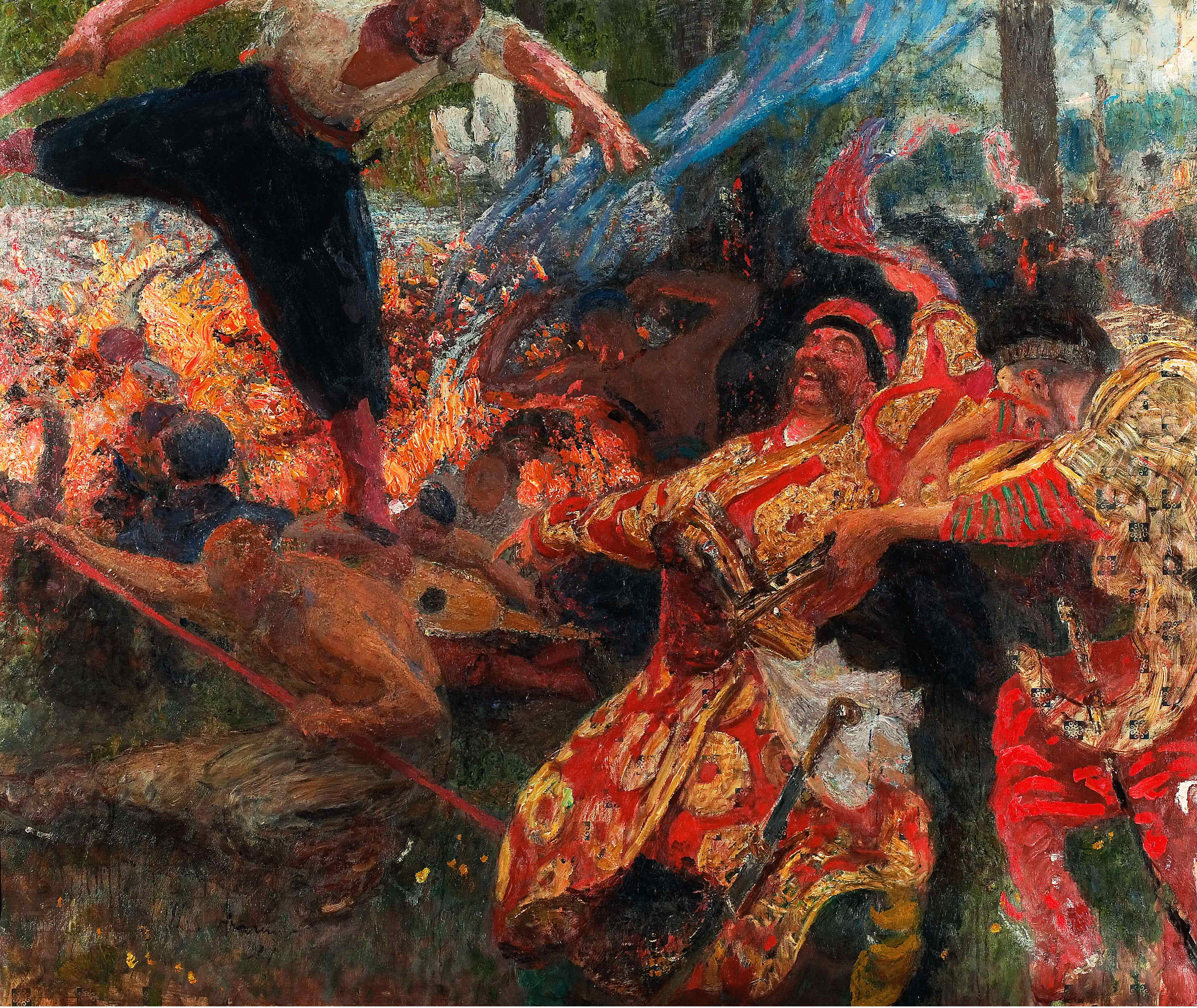 18 мая 1927 года Репин писал Чуковскому: «…больше полугода я работаю над картиной «Гопак», посвящённой памяти Модеста Петровича Мусоргского…». Был взят большой холст, и на нём стала компоноваться картина «Гопак – пляска запорожцев». Удаль, веселье. Холст как будто не может вместить всех фигур… Запорожцы прыгают через костёр, пляшут. «Даже столетний дид вприсядку пошёл», - пишет Репин друзьям о картине, пересказывая её сюжет. Снова началась переписка со знатоком Запорожской сечи учёным Яворницким. Репин просит прислать ему фотографии, так как ехать в Запорожье ему тяжело, он стар. Репину ещё много работы с «Гопаком» - в 1928 году он пишет Чуковскому, что, вероятно, ещё года на два. Работа над «Гопаком» шла в верхней не отапливаемой мастерской, куда Репин с трудом поднимался, только летом, вплоть до самой смерти от простуды 29 сентября 1930 года.(Кириллина Е. Репин в «Пенатах». Л., 1977, с. 198.)